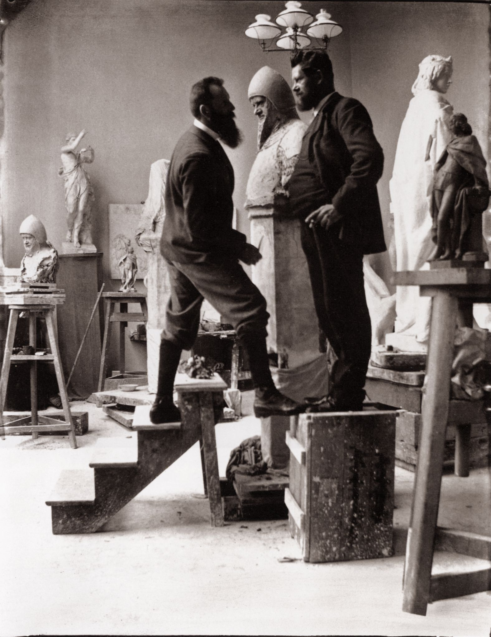 Zille, Heinrich: Künstlerkollegen und Ateliers, Heinrich Zille steht August Kraus Modell für die Büste des Wedigo von Plotho